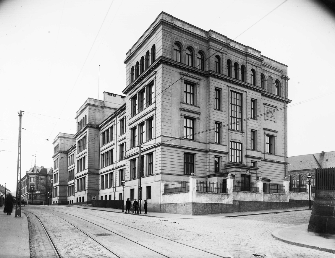 Uranienborg skole i 1913 med Harelabbveien opp til høyre i forgrunnen. Ukjent fotograf. Fra Byhistorisk samling hos Oslo Museum.